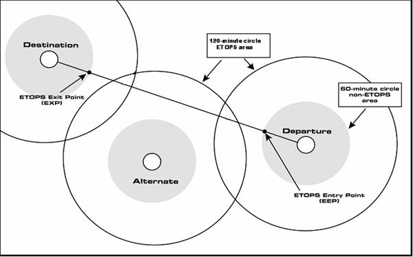 ETOPS